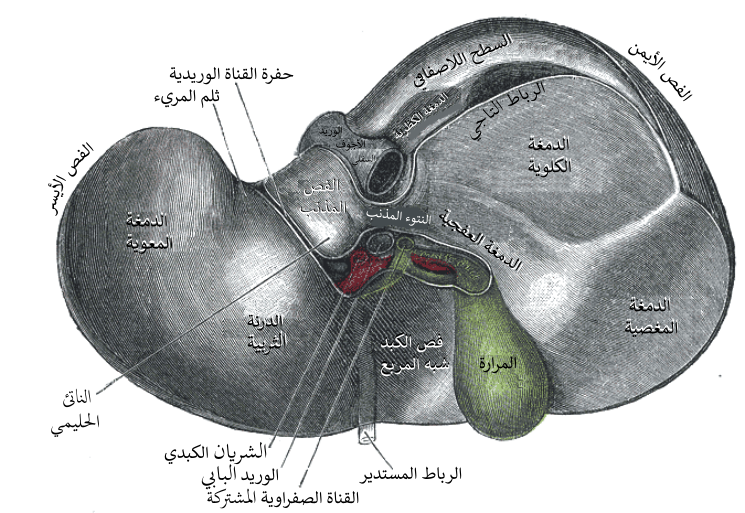 السطح السُفلي لِكبد الإنسان.